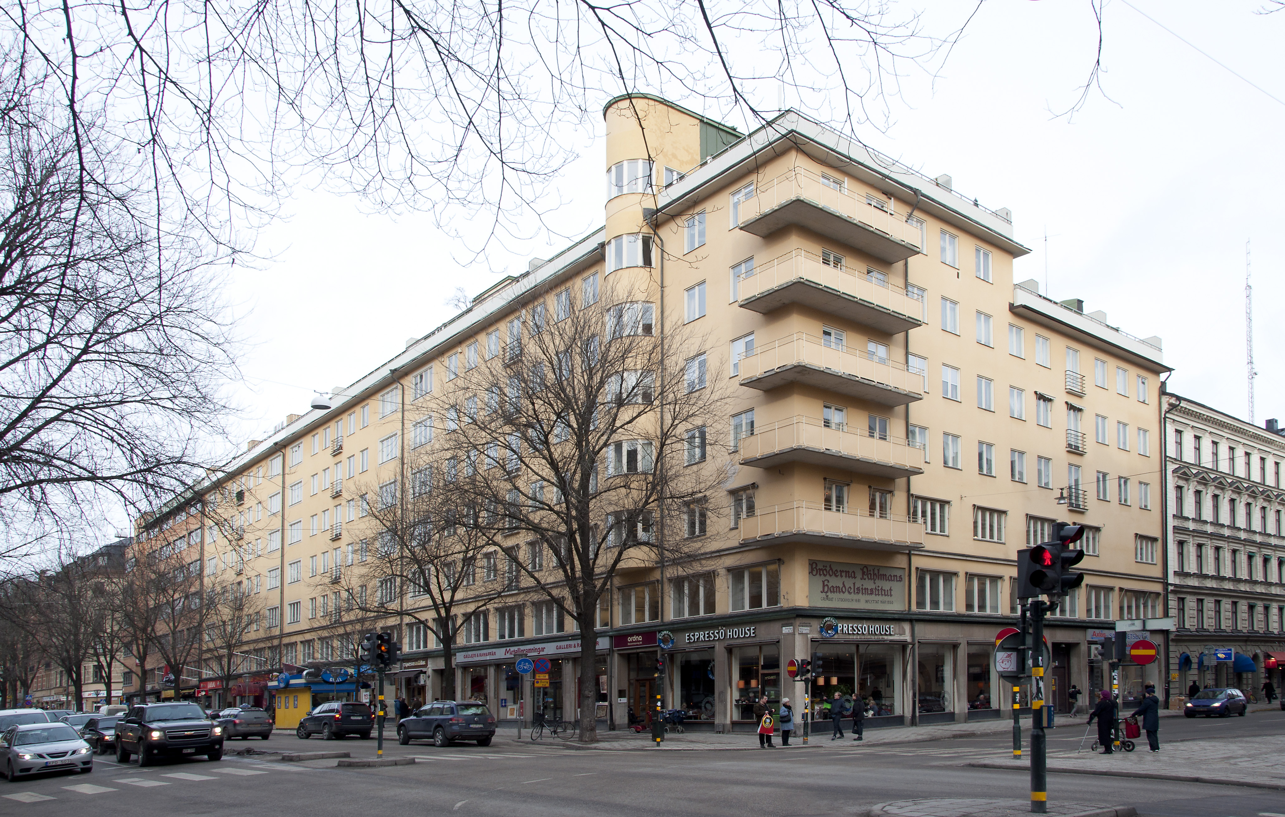 Sveavägen 82-88 / Rådmansgatan 54. Påhlmans handelsinstitut. Byggnadsår 1930, arkitekt Mauritz Dahlberg, byggherre J Påhlman, R byggmästare Olle Engkvist